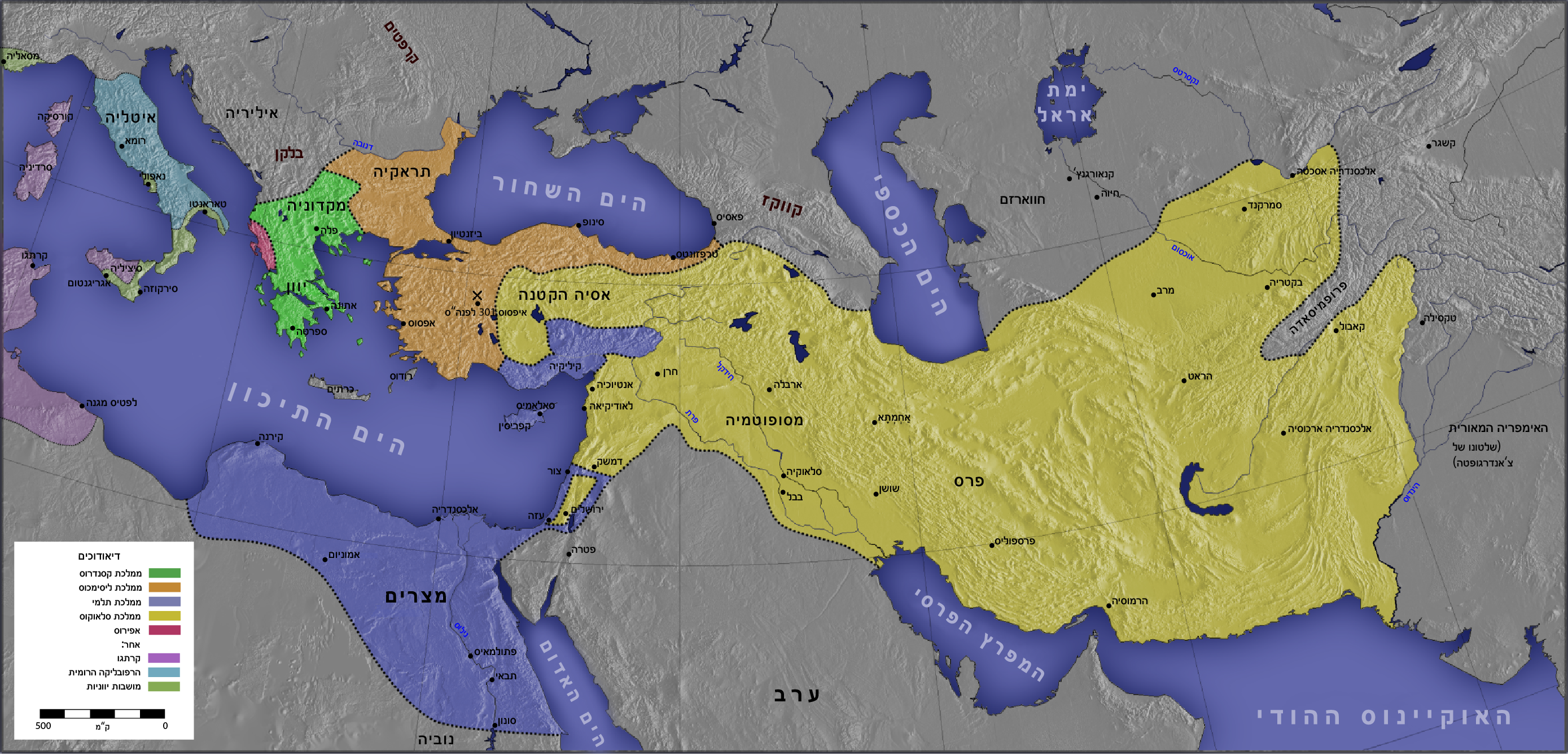 מלחמות הדיאדוכים.